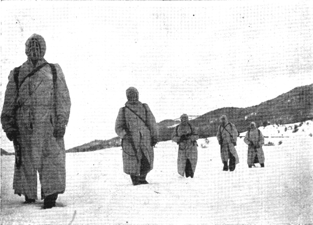 Srpskohrvatski / српскохрватски: Grupa partizanskih specijalaca u Sloveniji 1944.